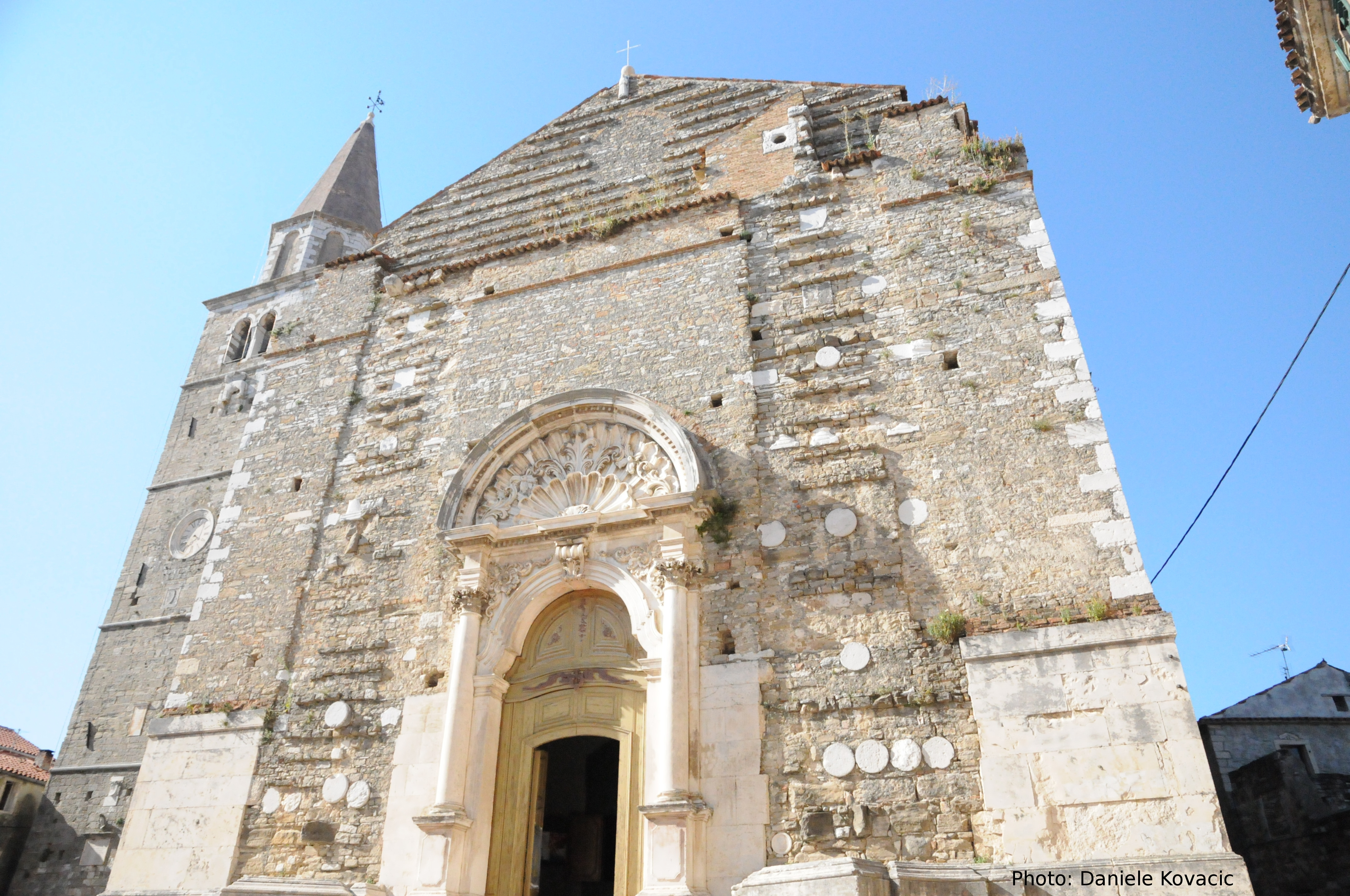 Duomo di San Servolo: è situato a Buie (Croazia) nell'omonima piazza.